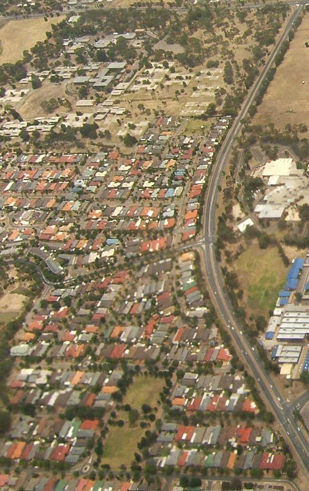 Oakden in Adelaide